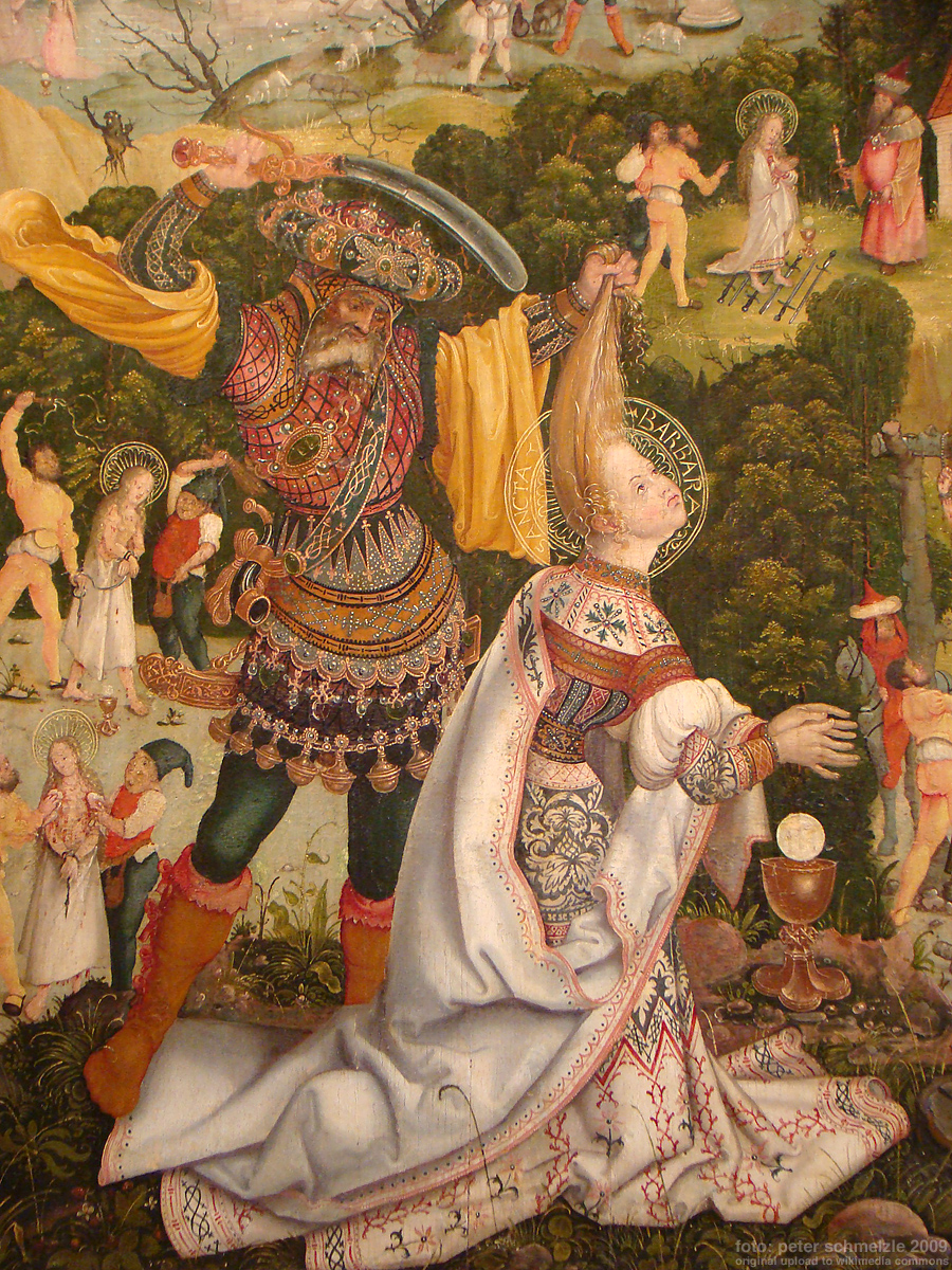 Detail vom Barbara-Altar von Jerg Ratgeb in der Stadtkirche Schwaigern